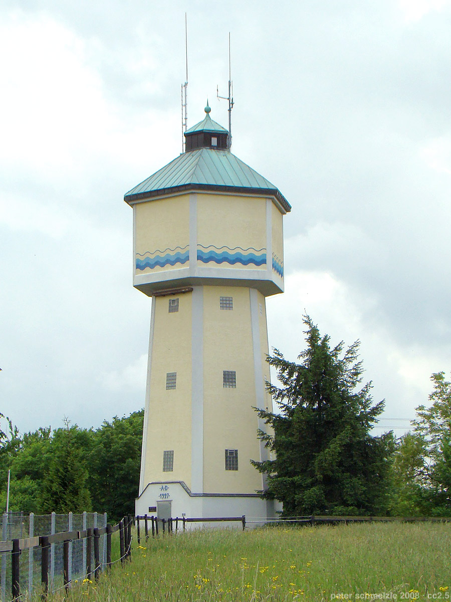 Wasserturm in Hüffenhardt